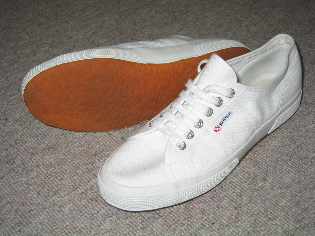 Superga shoes